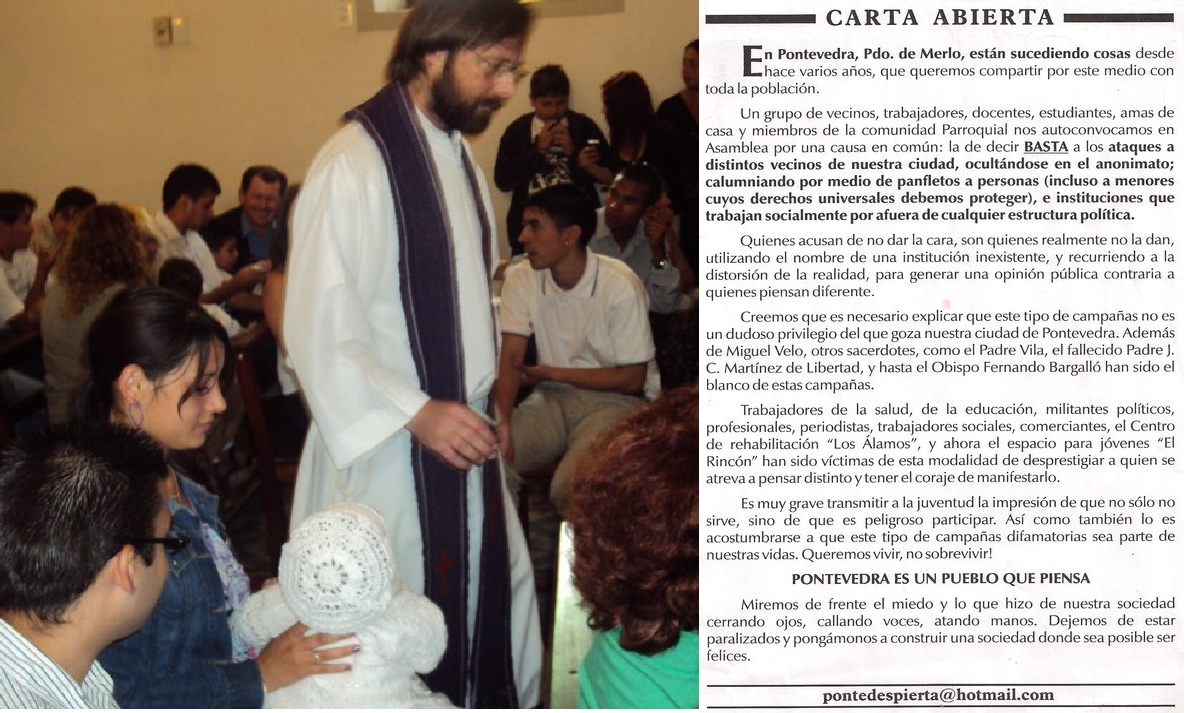 Miguel Velo, sacerdote católico de la localidad de Pontevedra y feligresía. A la derecha, volante en el que un grupo de vecinos se solidarizan con el sacerdote.